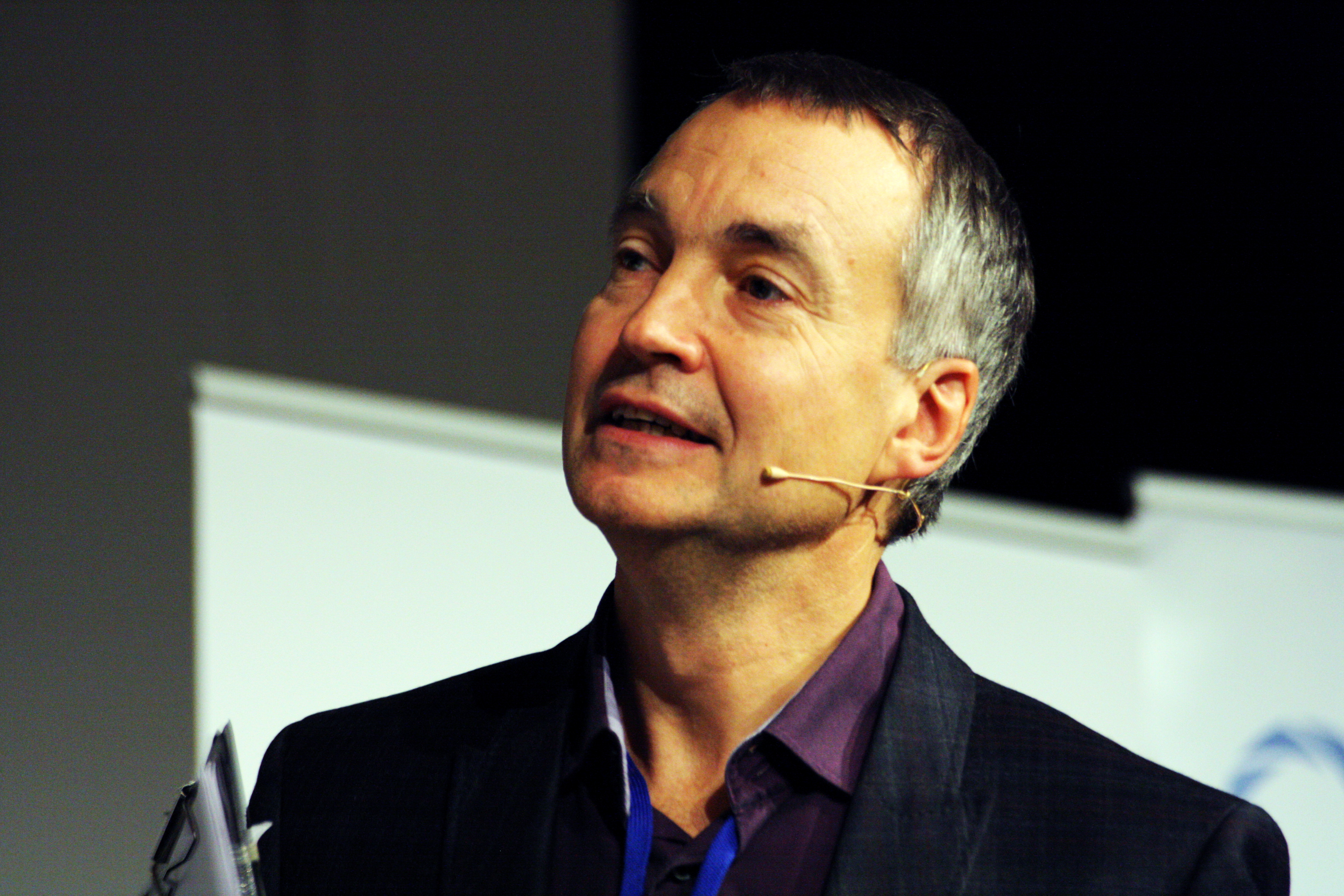 Politisk analytiker Aslak Bonde ledet paneldebatten under konferansen Transport og logistikk.